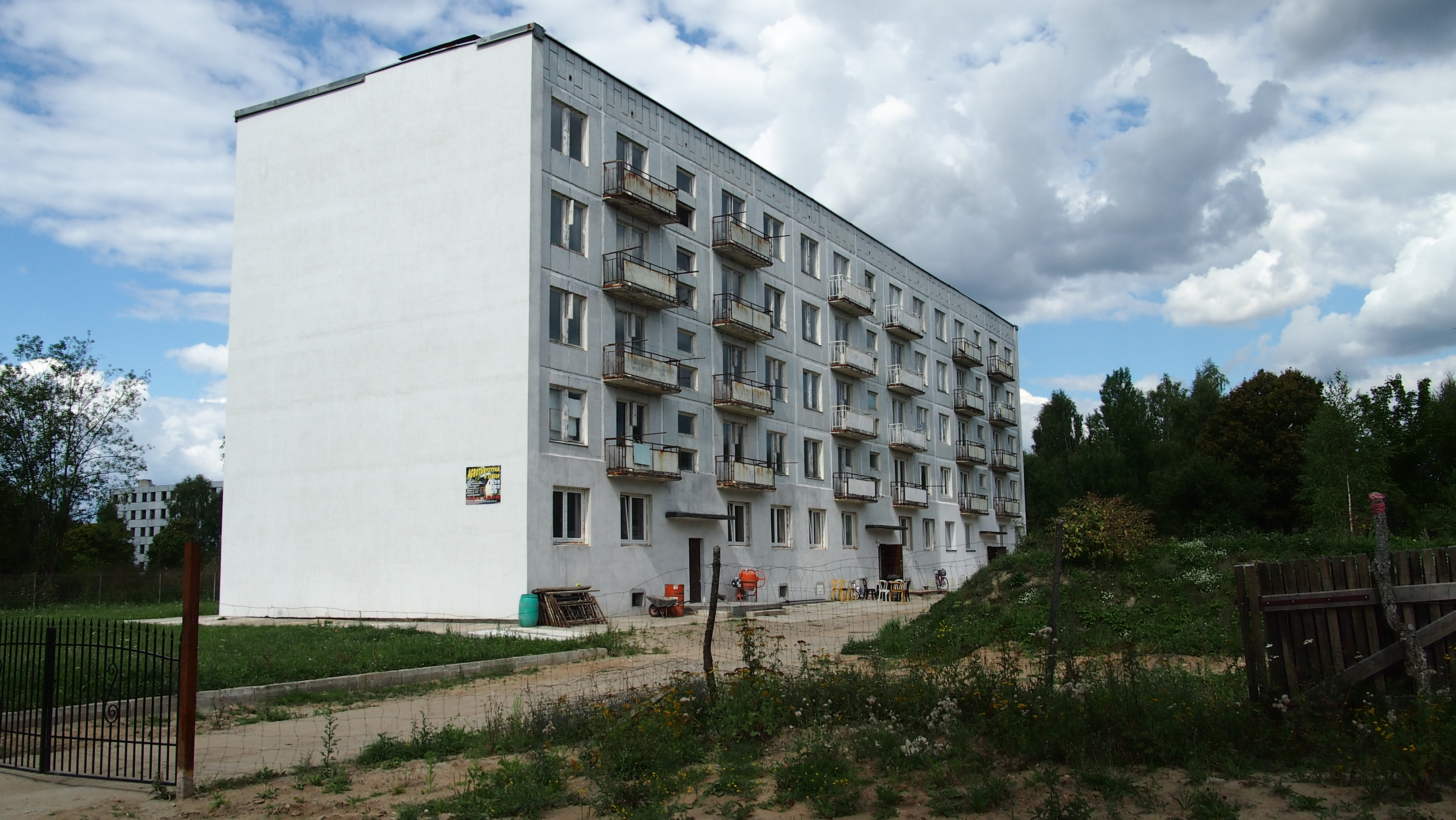 Kłomino, Poland